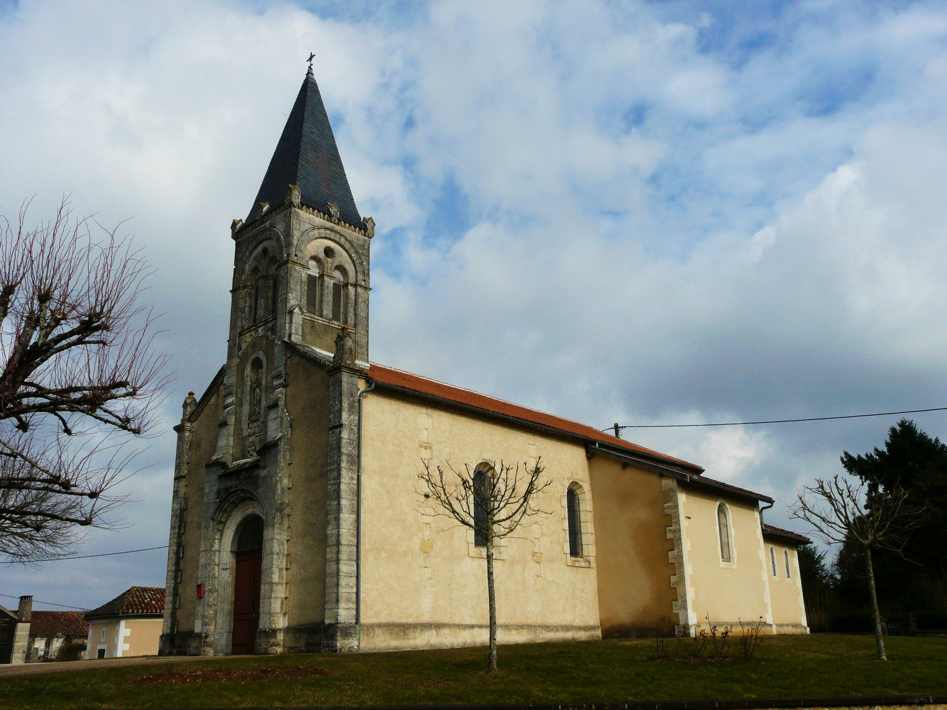 L'église Saint-Barthélemy vue du sud-ouest, Église-Neuve-de-Vergt, Dordogne, France